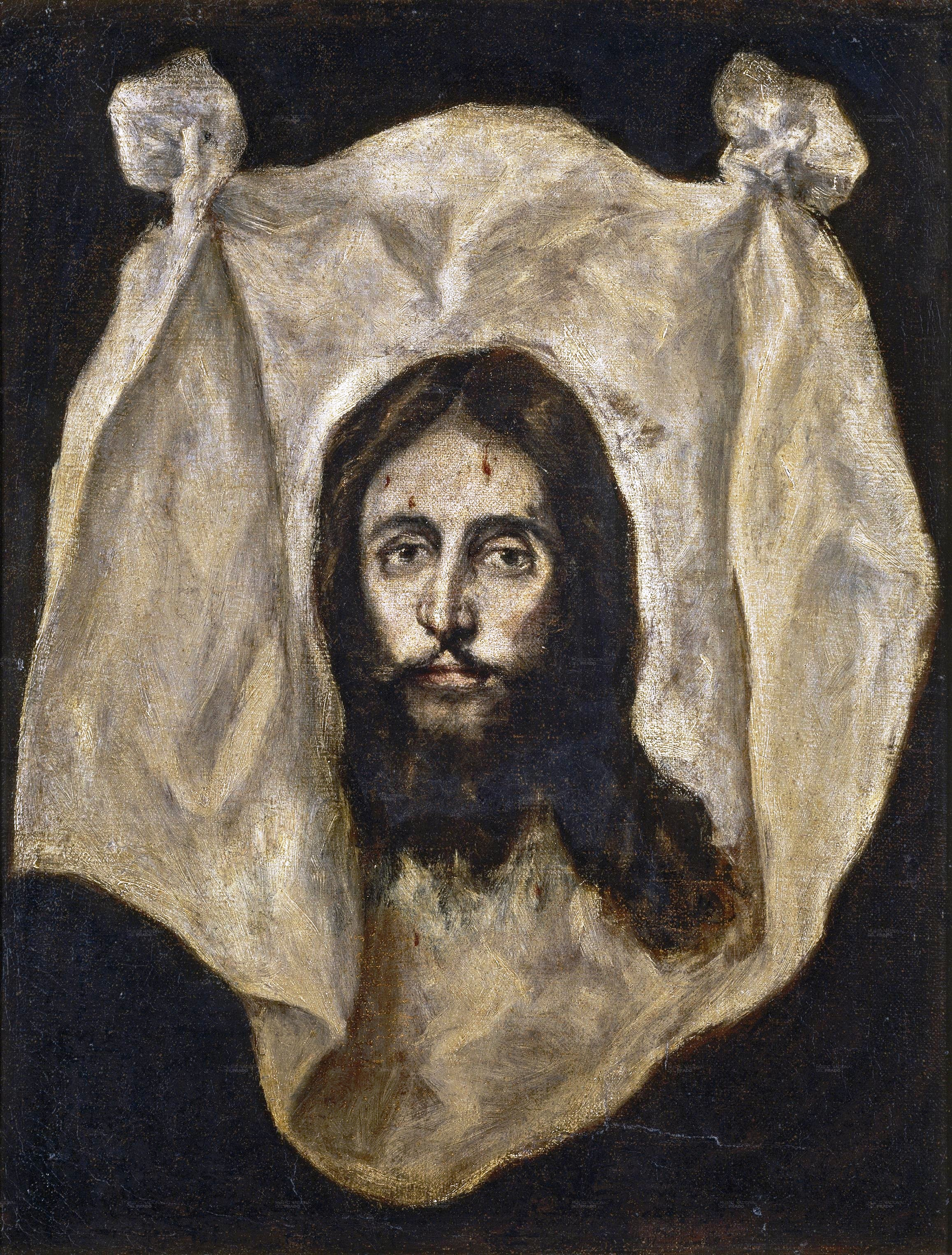 La obra representa la reliquia de la Santa Faz, conocida también como el velo o paño de la Verónica.